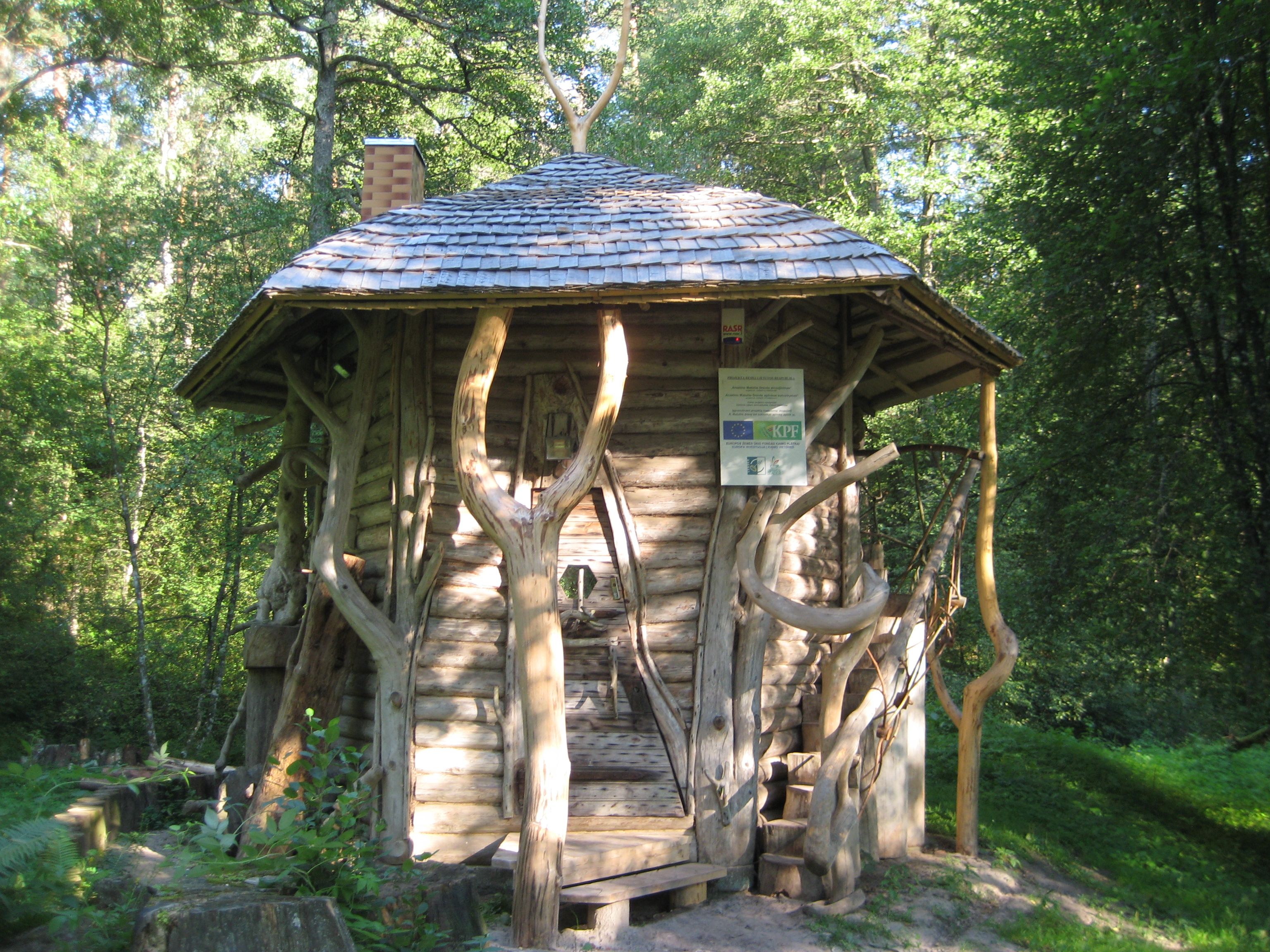 Kaniavos sen., Lithuania